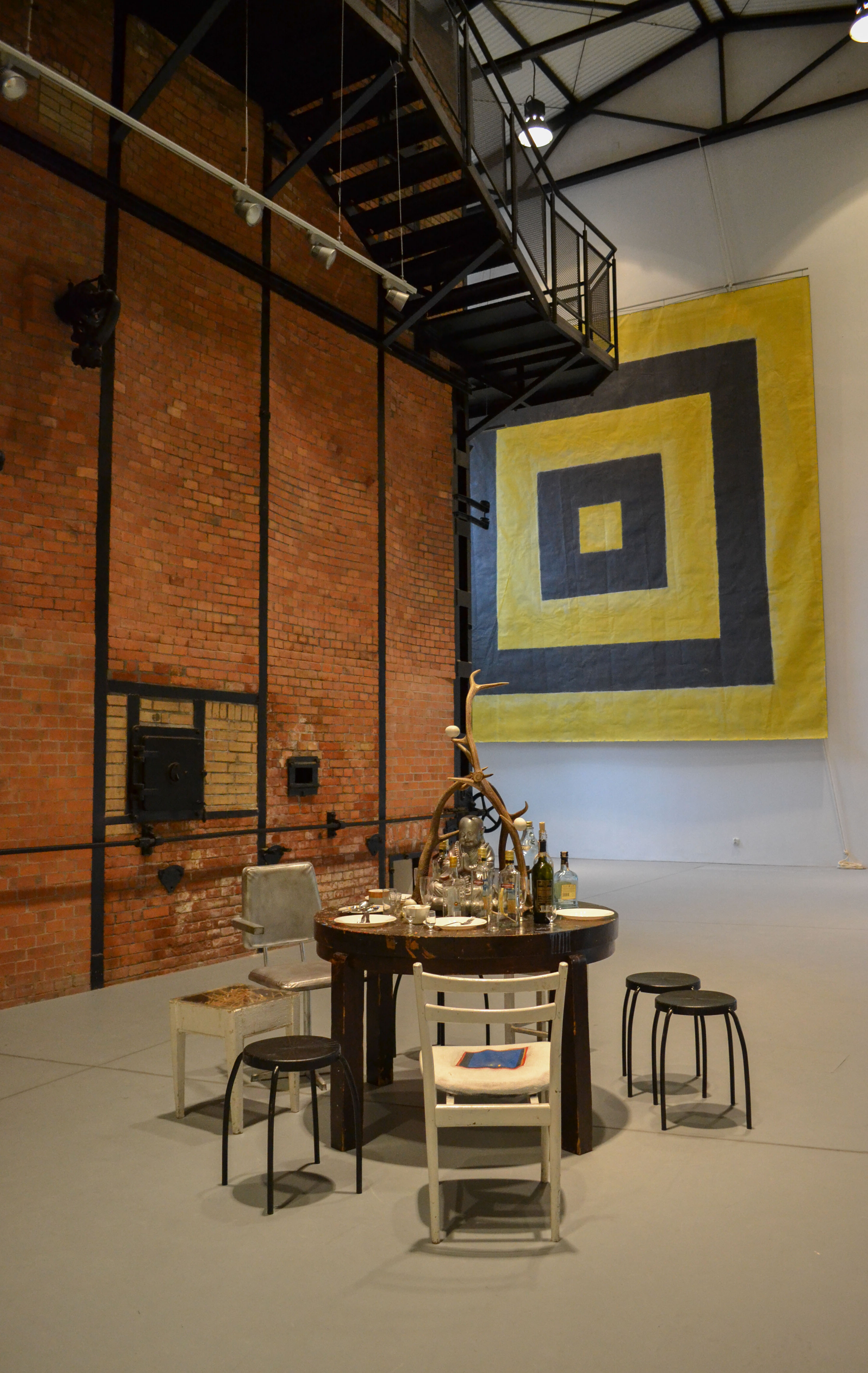 MCSW Elektrownia Radom - sala ekspozycyjna z piecem